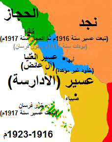 خريطة عسير ما بين سنتيّ 1916 و1923م.